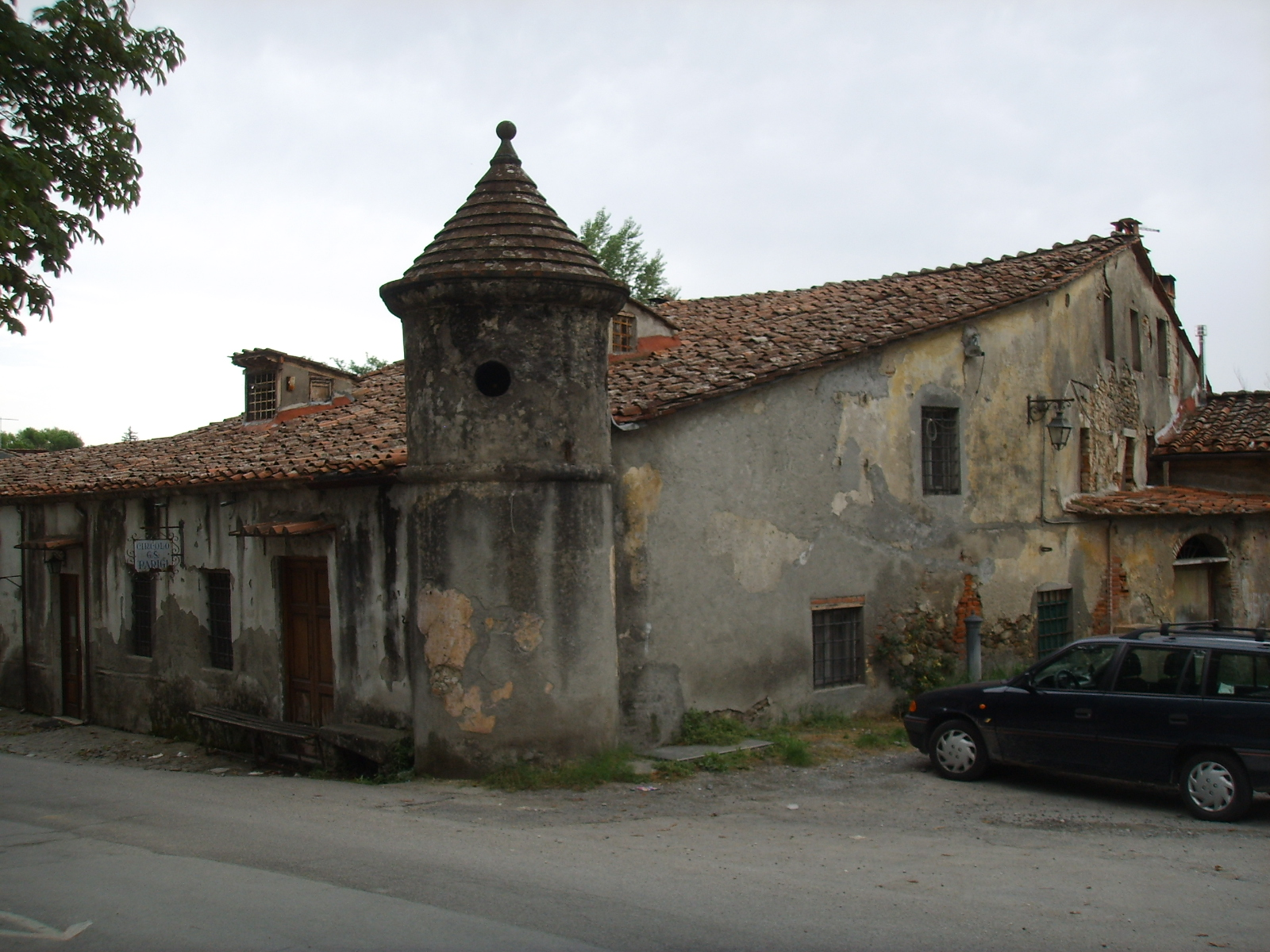 Villa torrigiani di lucca, borgo parigi